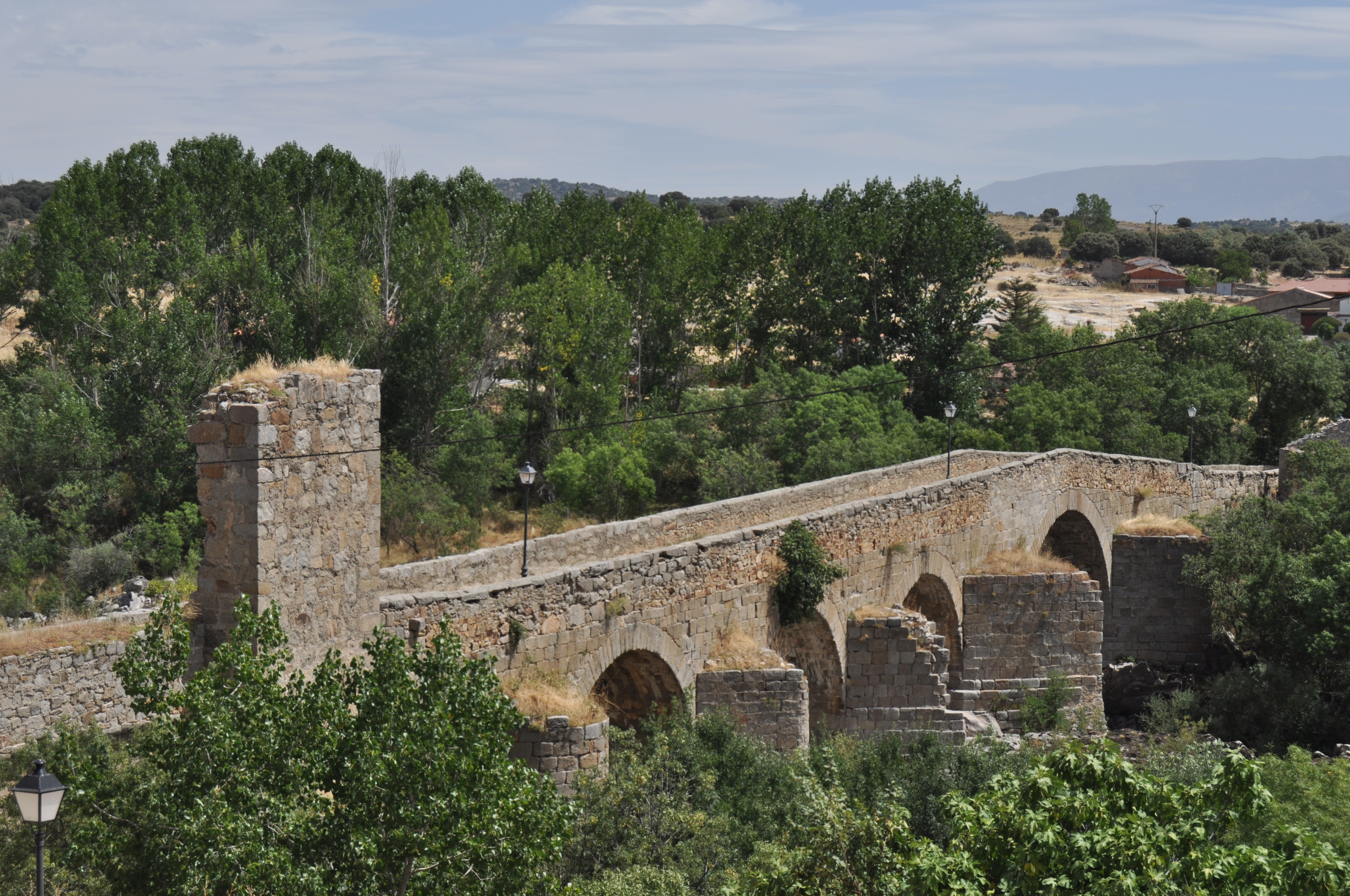 Puente del Congosto - 015